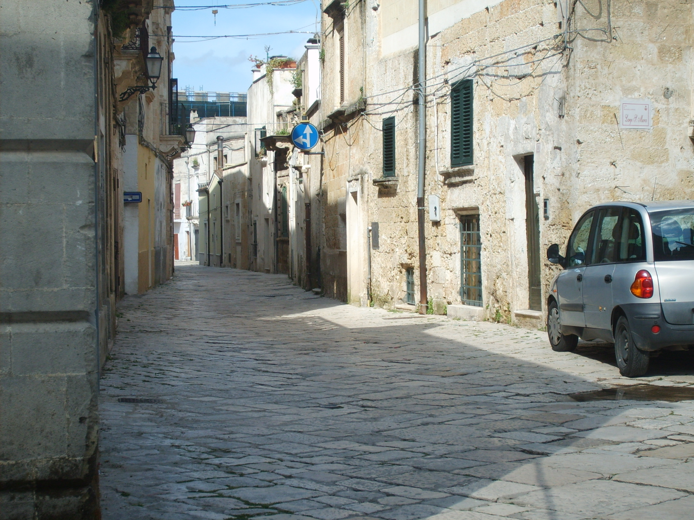 Stradine del centro storico